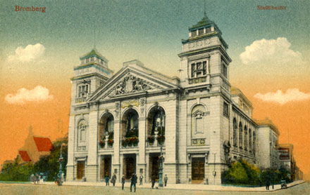 Teatr Miejski w Bydgoszczy (1909)